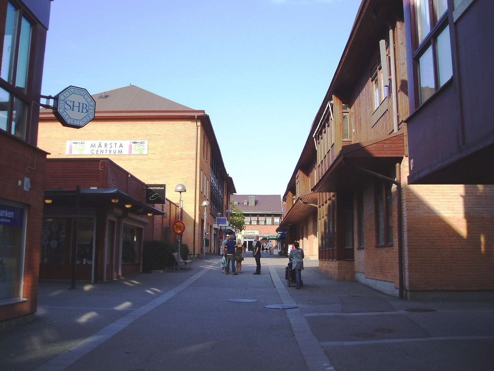 Märsta Centrum, Sigtuna kommun.